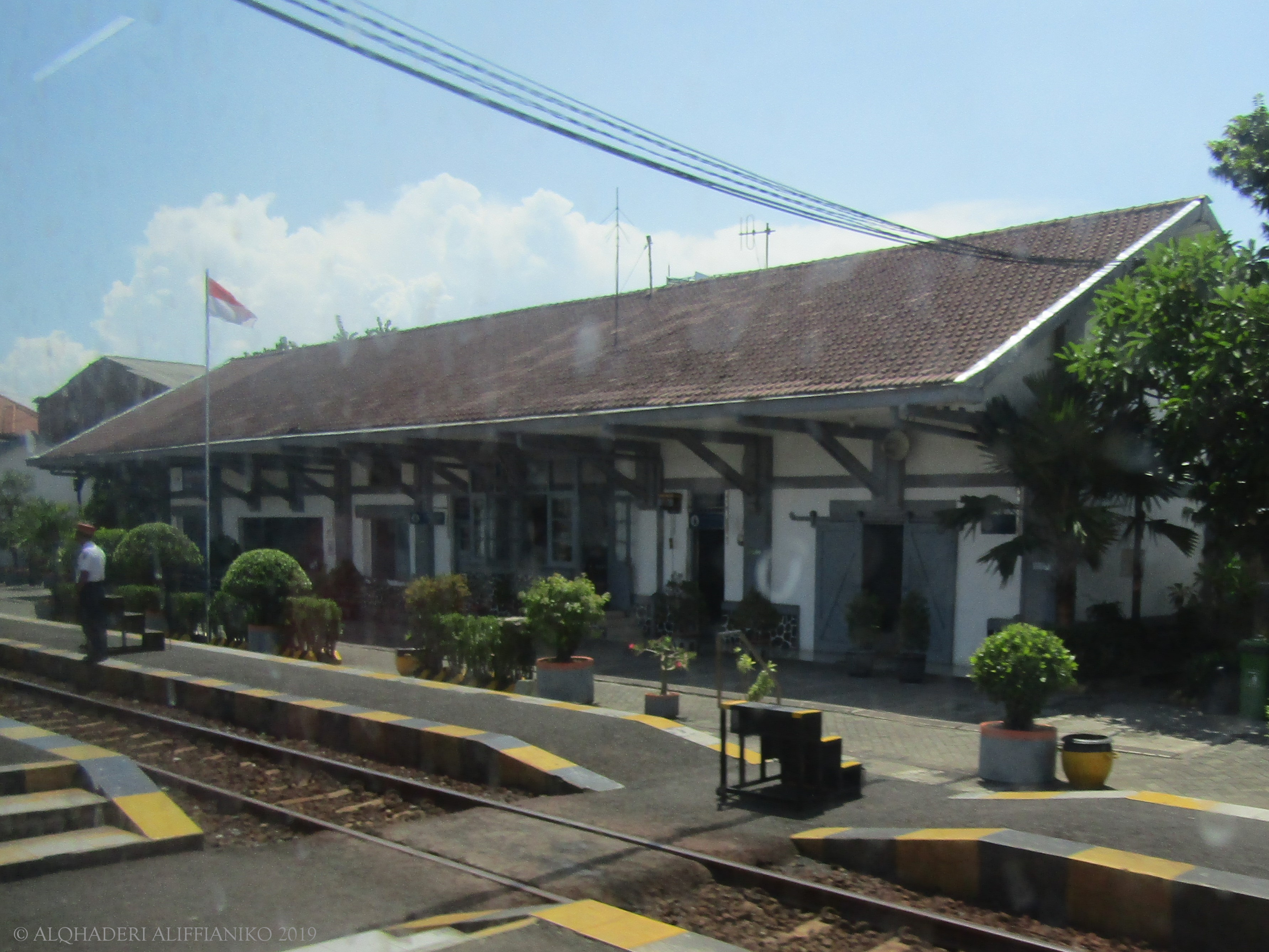 Stasiun Gedangan, dilihat dari peron